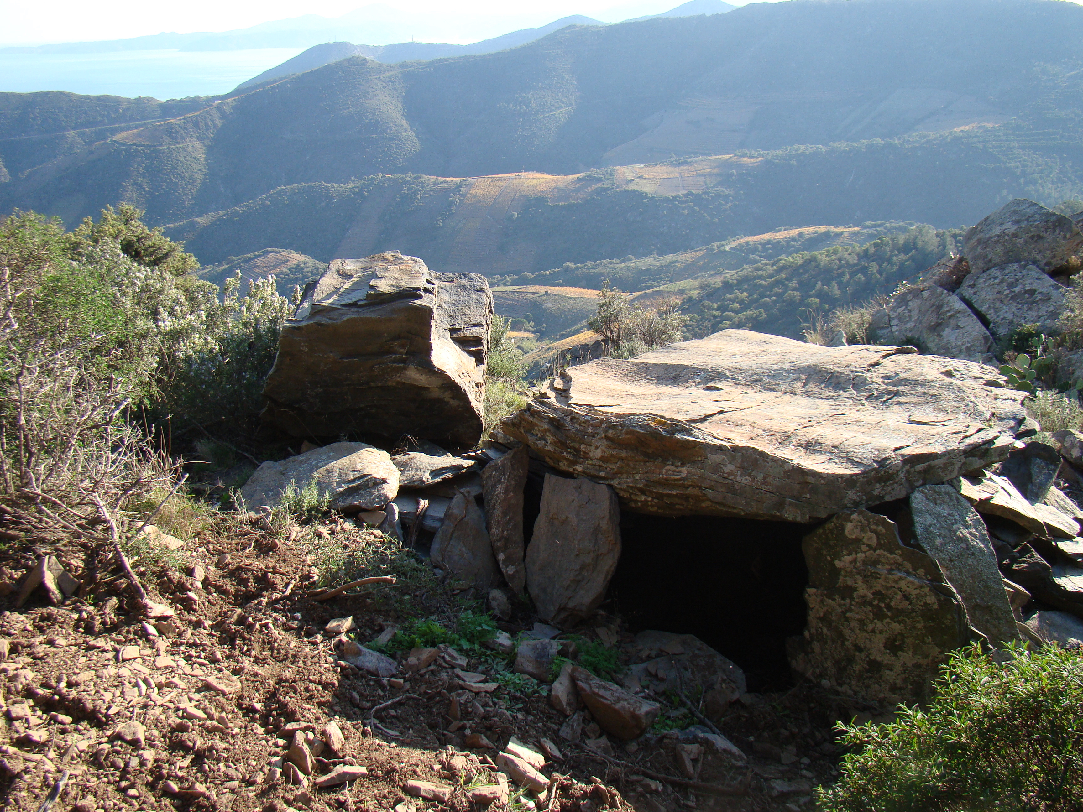 Dolmen de la Coma Enestapera